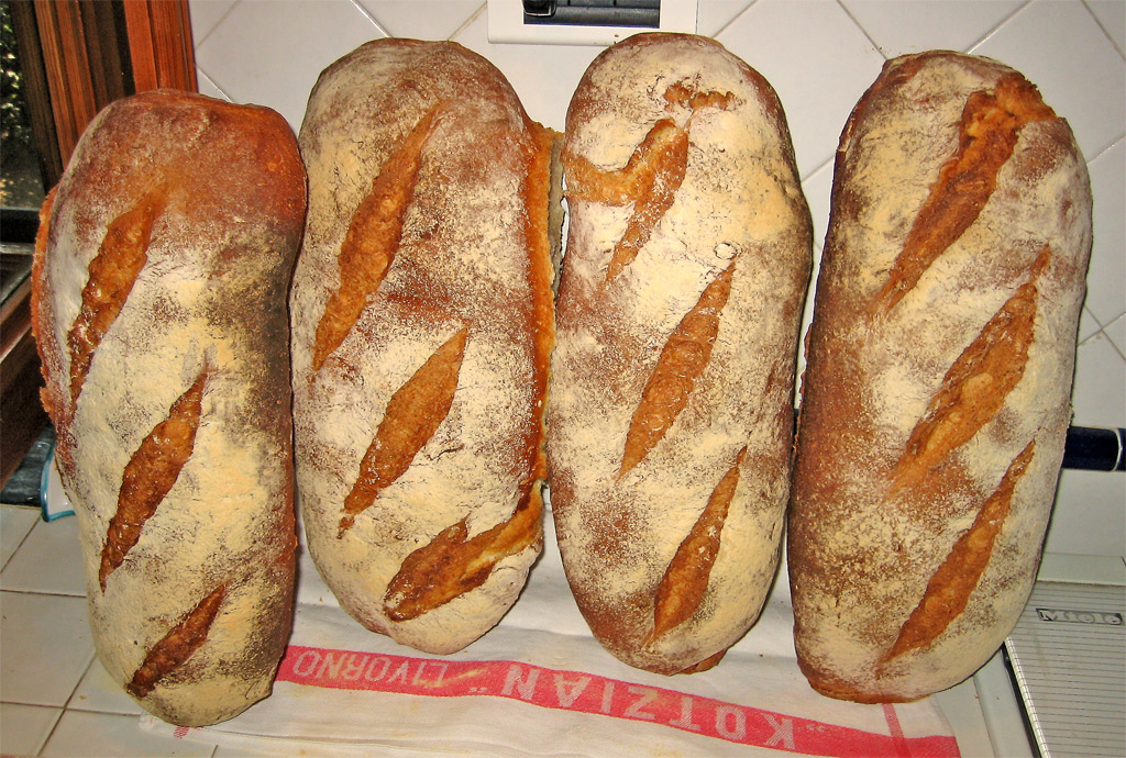 l'intera produzione ricetta/recipe sul mio Blog